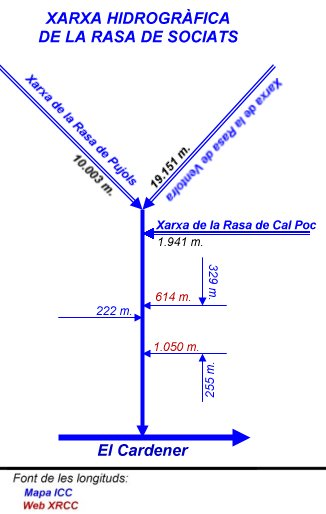 Mapa esquemàtic de la xarxa hidrogràfica de la Rasa de Sociats, al Solsonès.